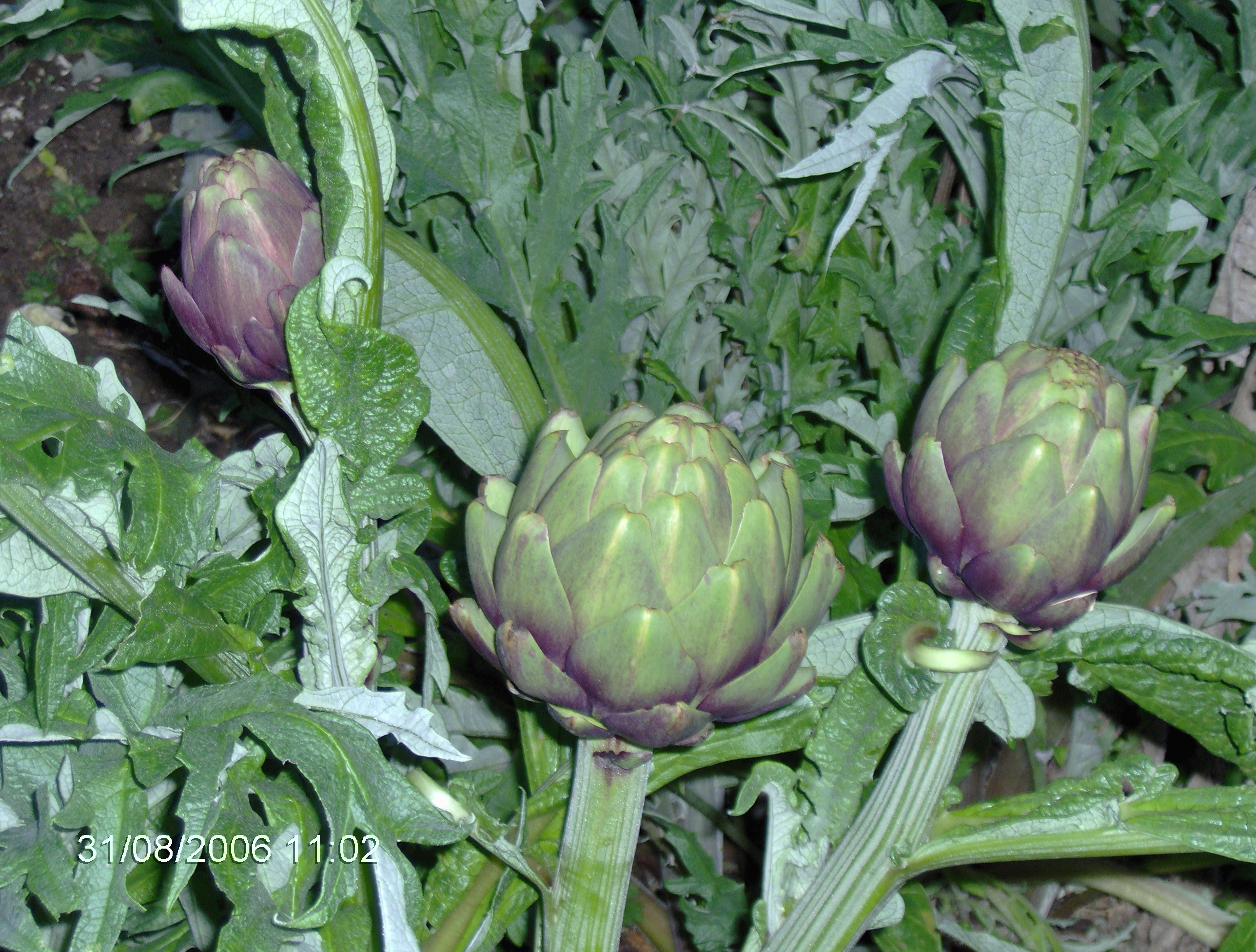 Plant d'artichaut violet